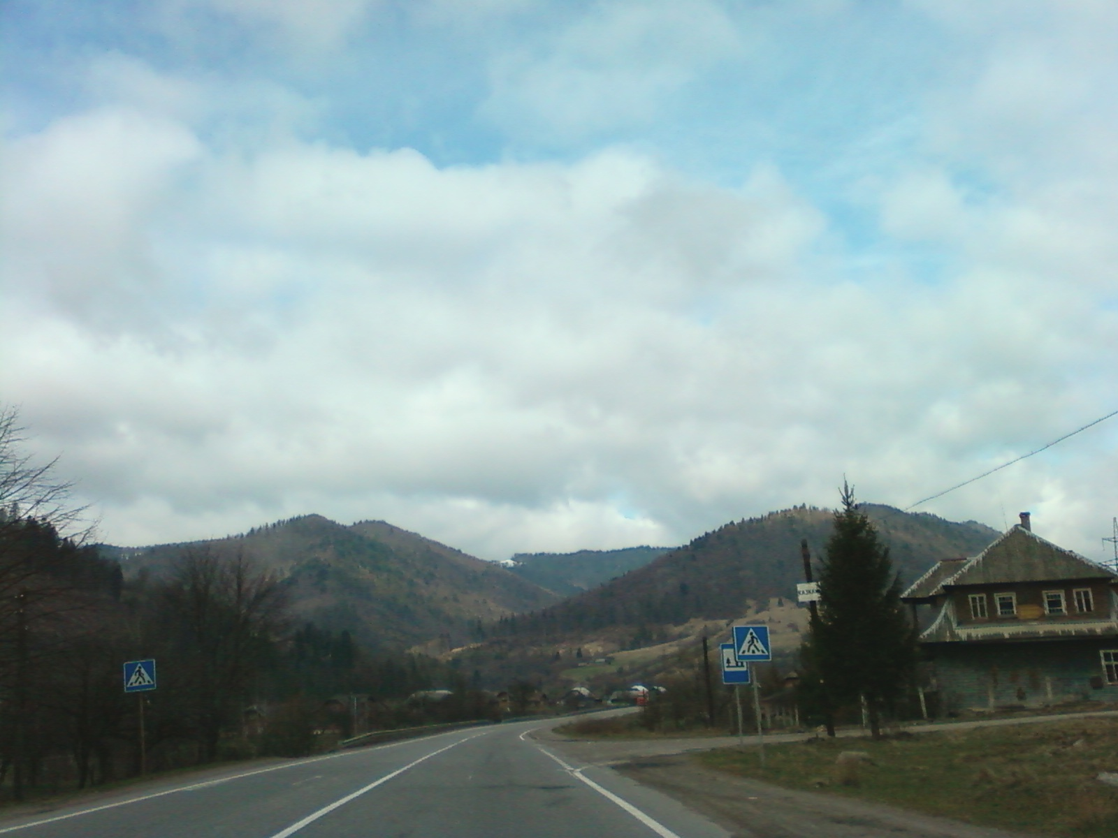 Cколевщина